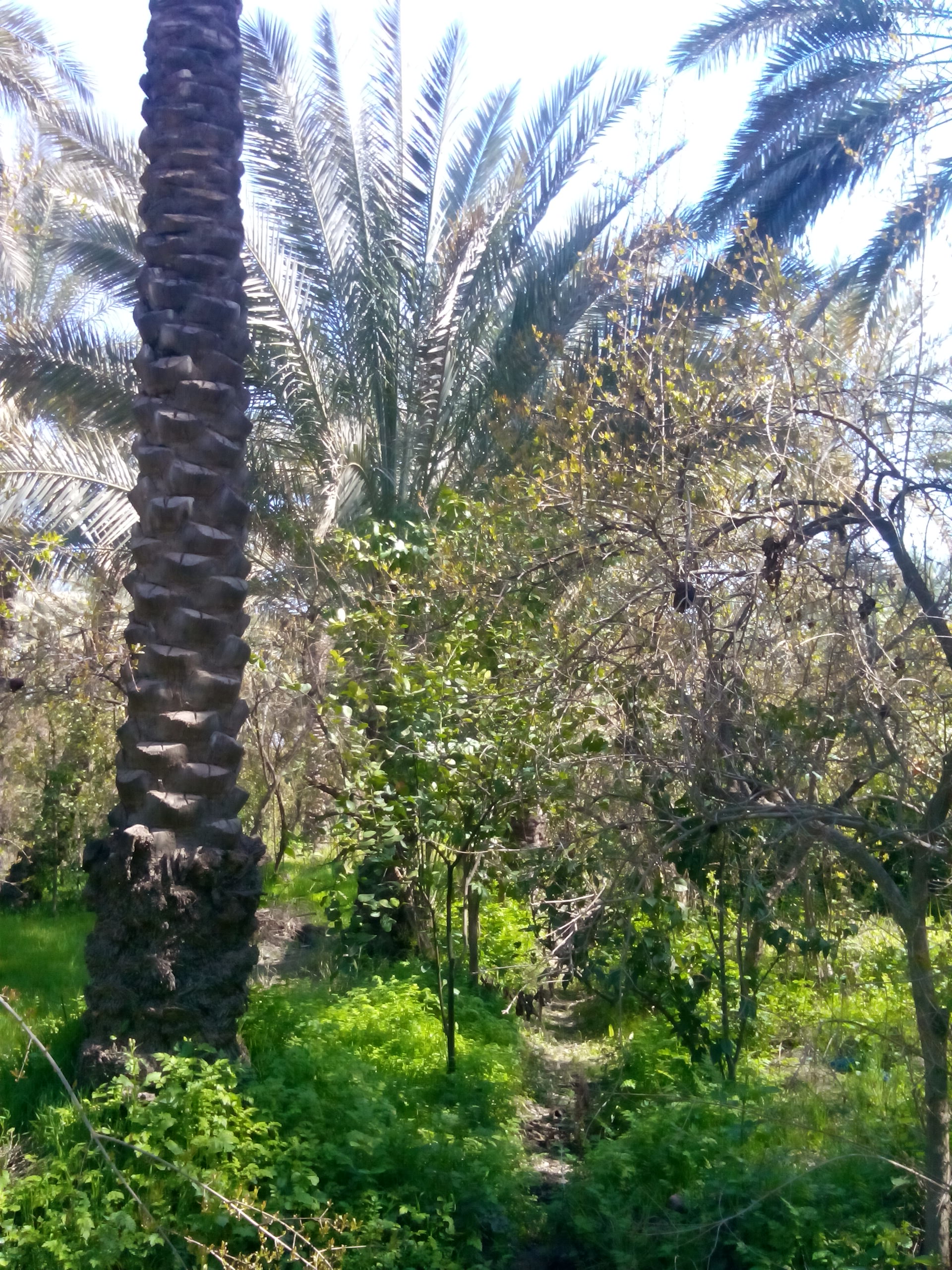 بستان نخيل في قرية تابعة لناحية المحمودية (الأسود) في مدينة الخالص شرق بغداد